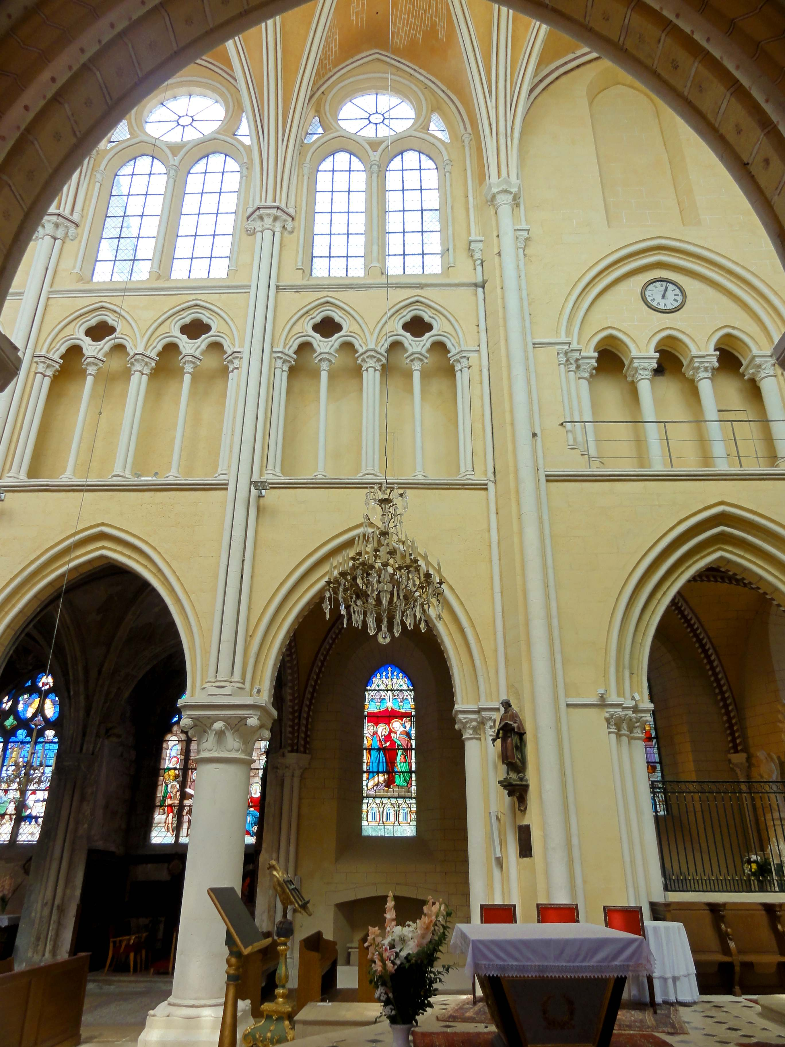 Voir titre.